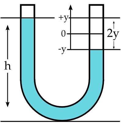 Wasserpendel